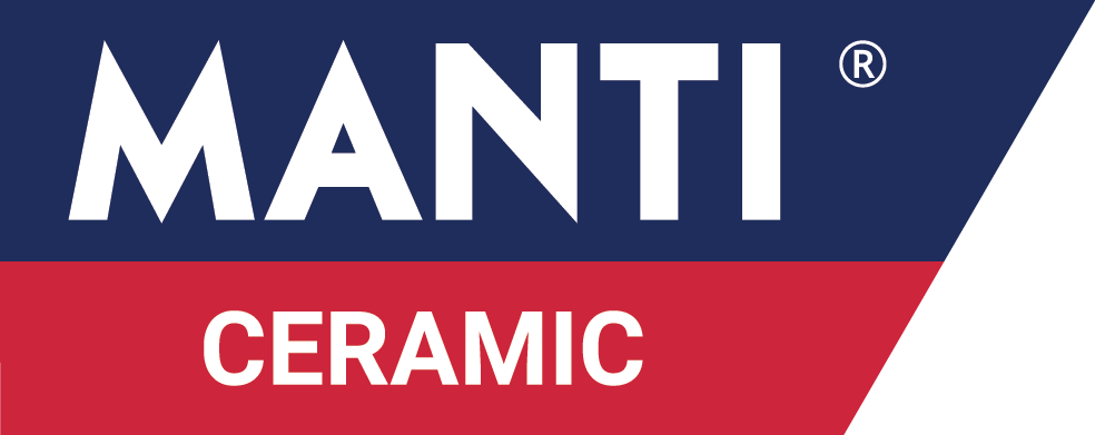 MANTI CERAMIC Logo